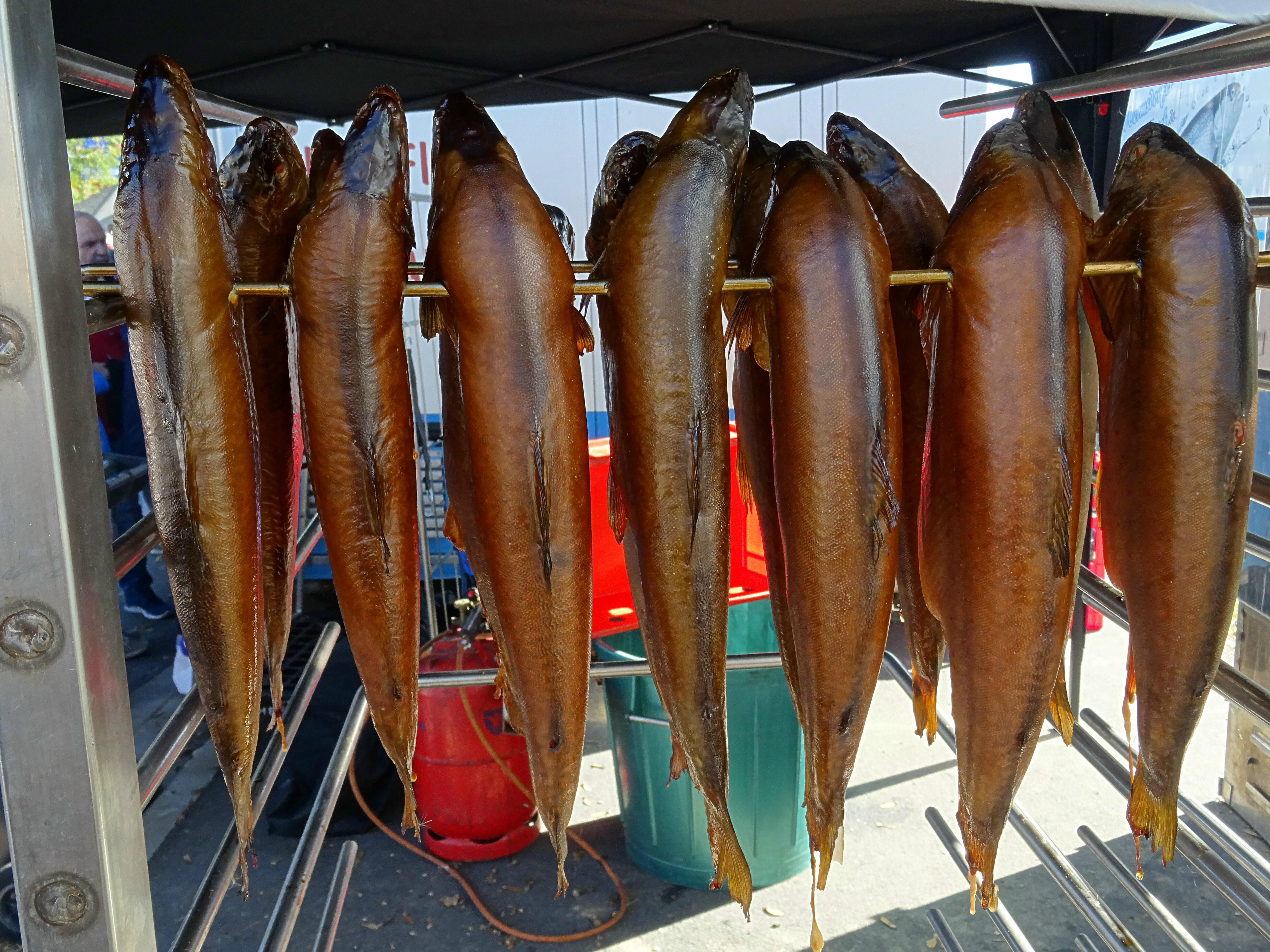 Horstseefischen: Seit 500 Jahren sind Zuchtfische aus Wermsdorf begehrt. Beim 50. Fischerfest vom 11. bis 13. Oktober 2019 wird das Abfischen aus dem 70 Hektar großen Horstsee traditionell gefeiert.